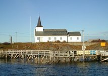 Helligvær kirke, Bodø